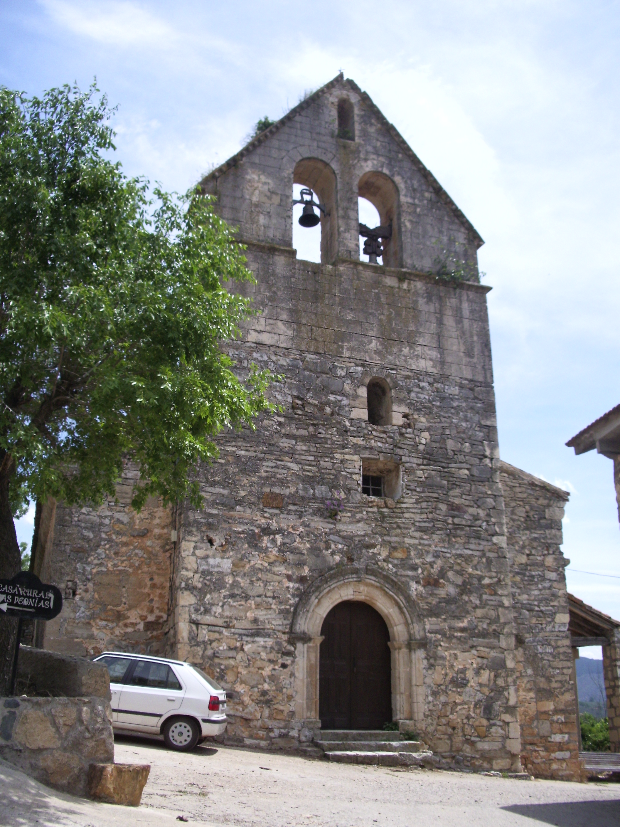 Vista de la iglesia de Almiruete